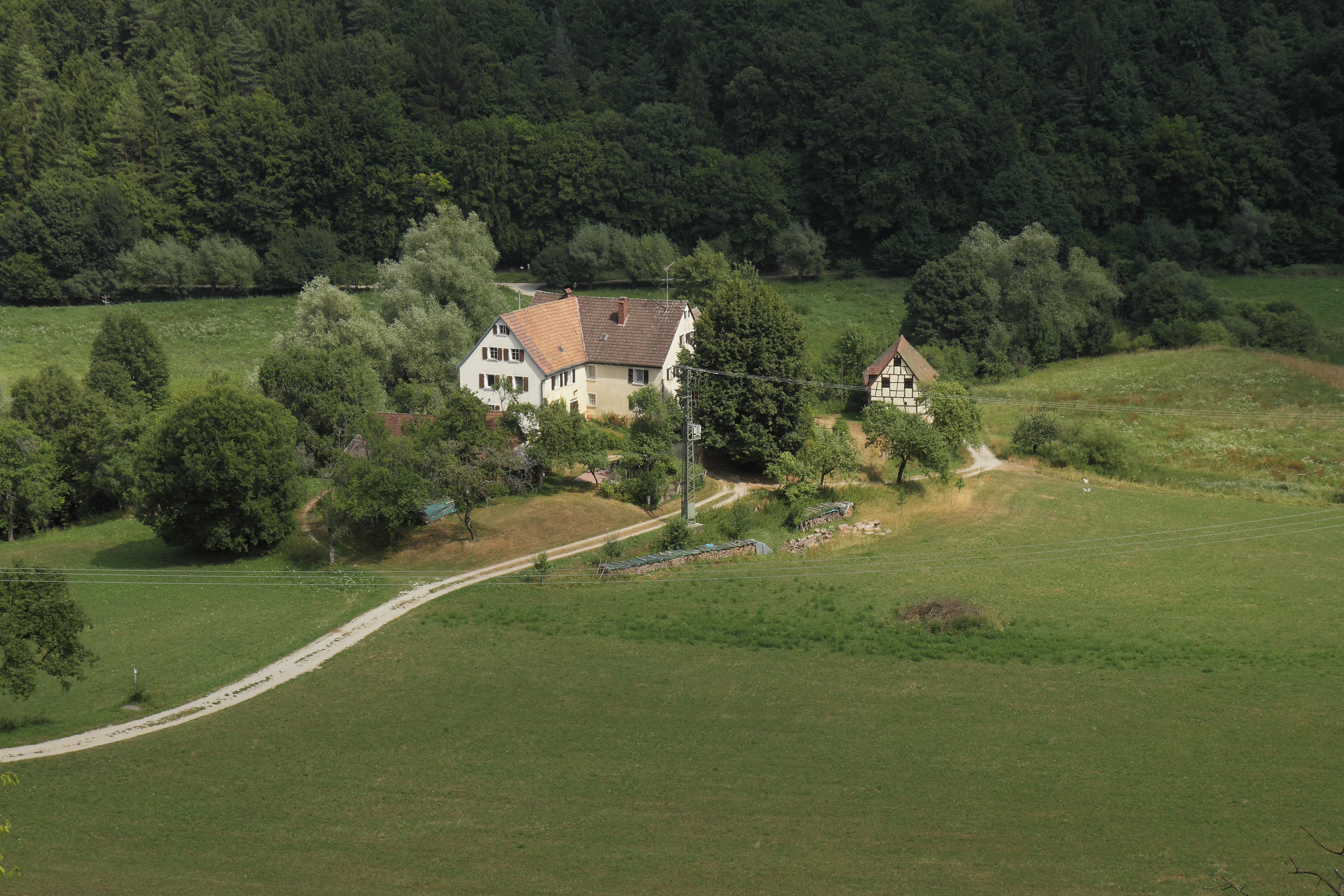 Burgstall Dörnhof - Ansicht des heutigen Bauernhofes aus westlicher Richtung (Juni 2013)